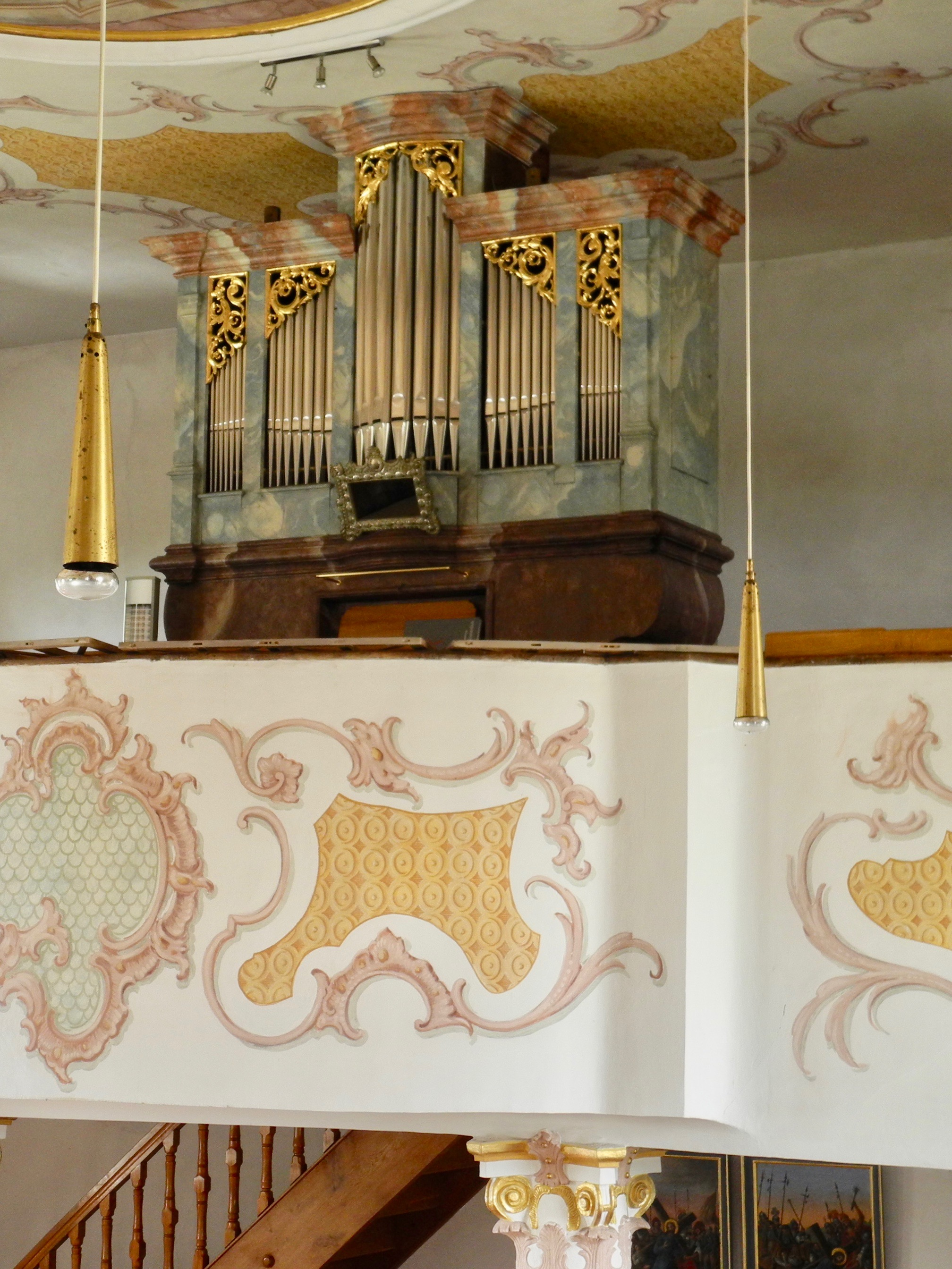 Prospekt und Werk erhalten, Restaurierung Orgelbau Sandtner